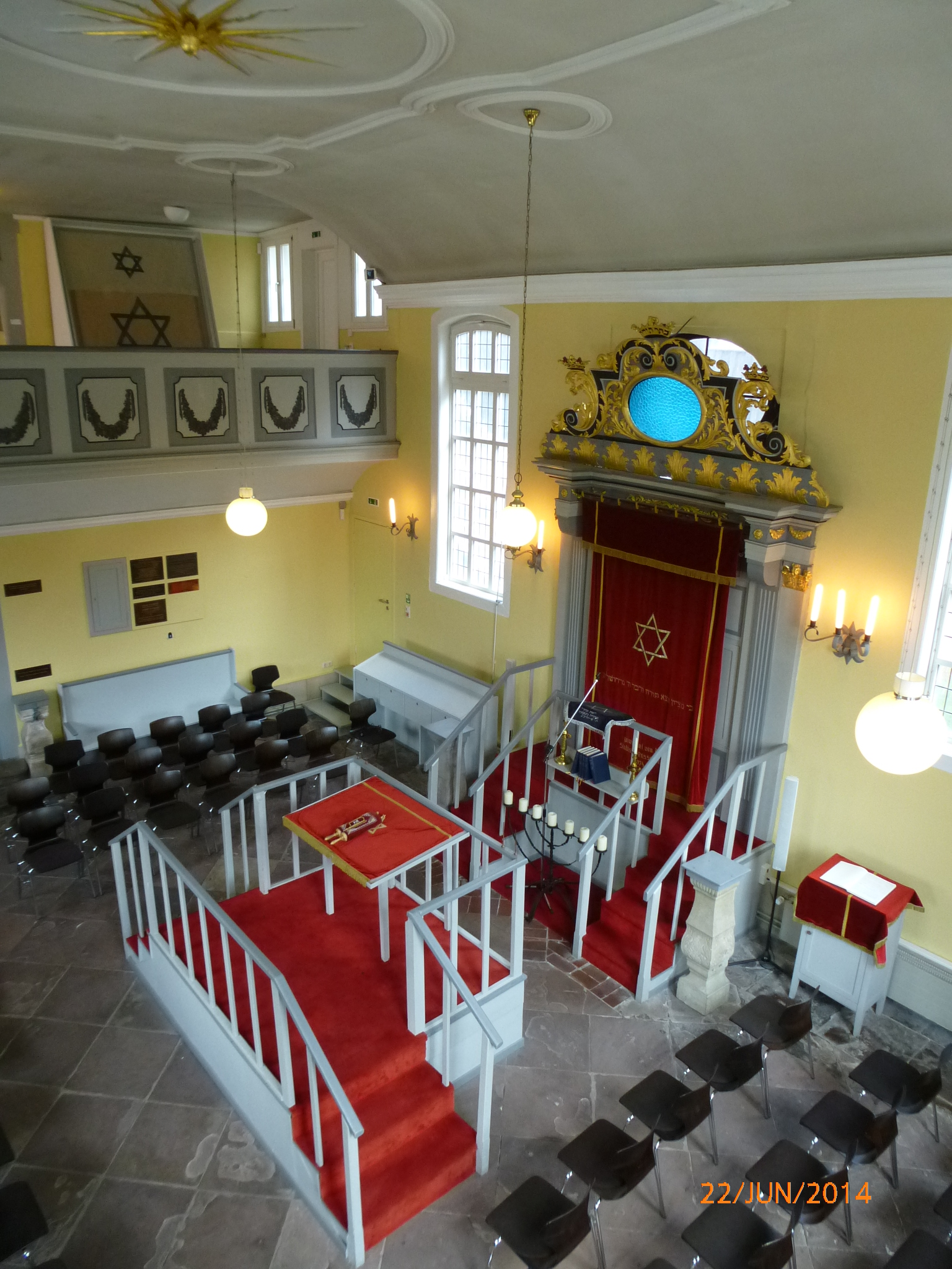 Synagoge Celle, innen